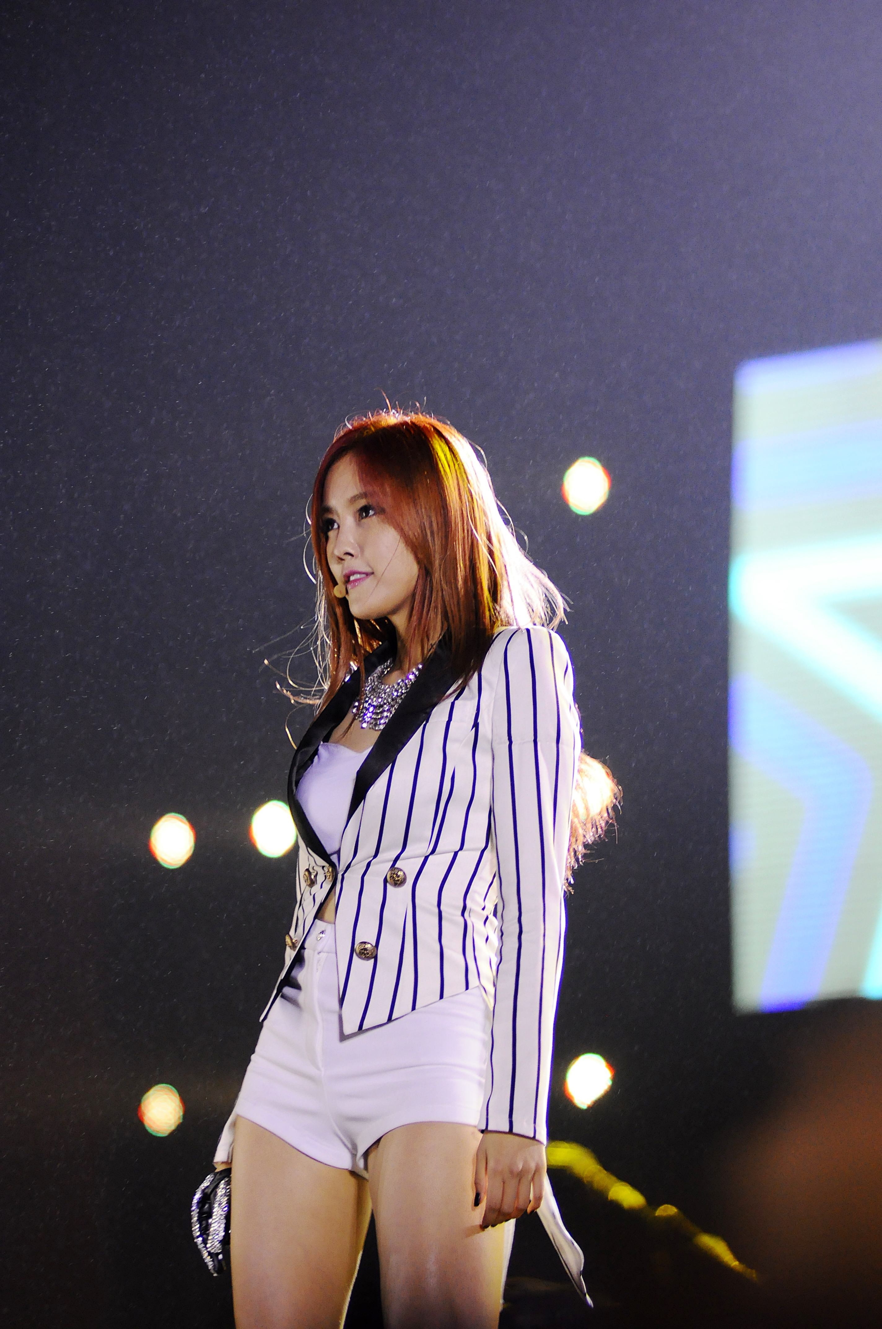 Hyomin_ T-Ara :X :*